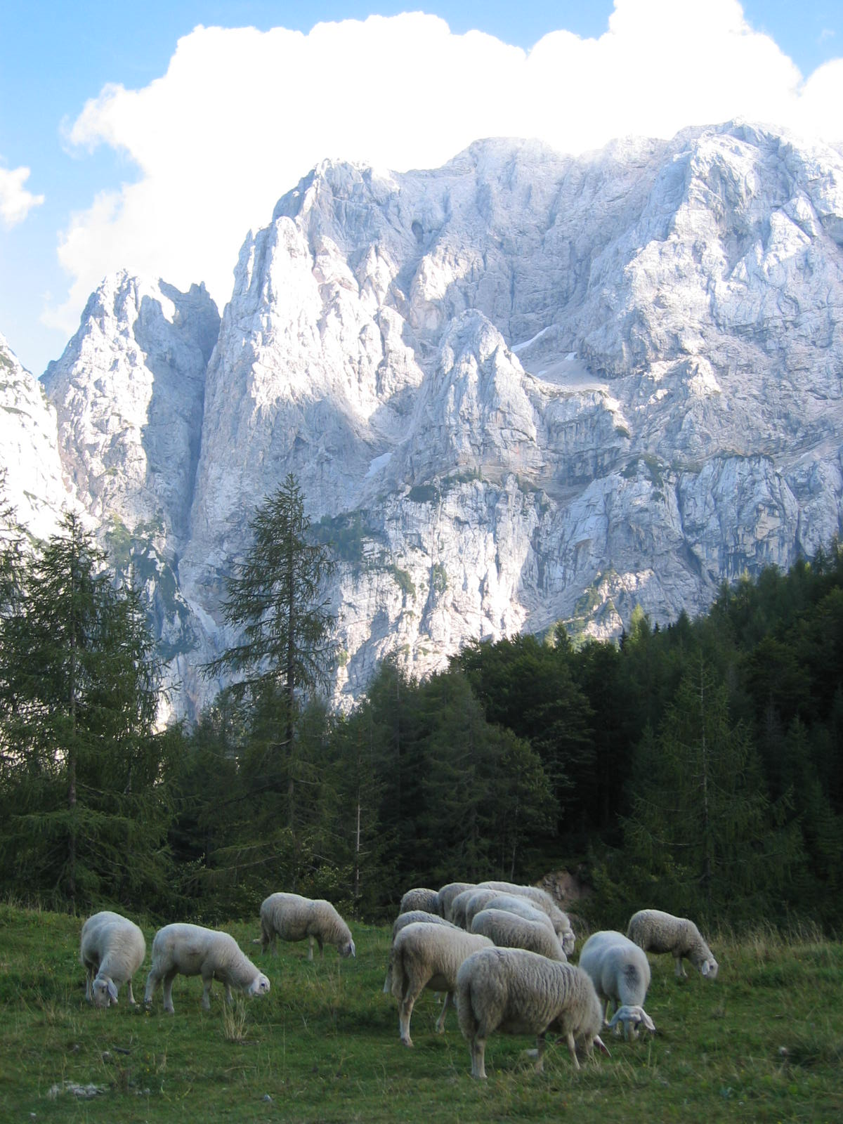 Prisojnik (2547 m) (widok z okolic Erjavčeve koče na Vršiču)